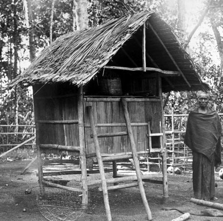 Repronegatief. Karobataks kippenhok